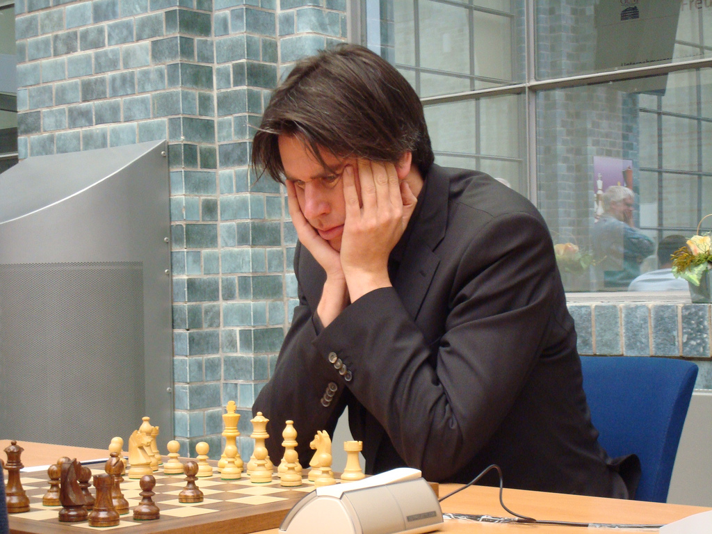 GM Sebastian Siebrecht Germany, Schachbundesliga 2008